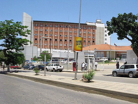 Maternidade Lucrécia Paím, Luanda, Angola